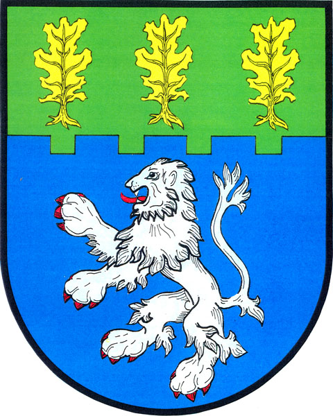 Znak obce Olešnice (okres Hradec Králové)